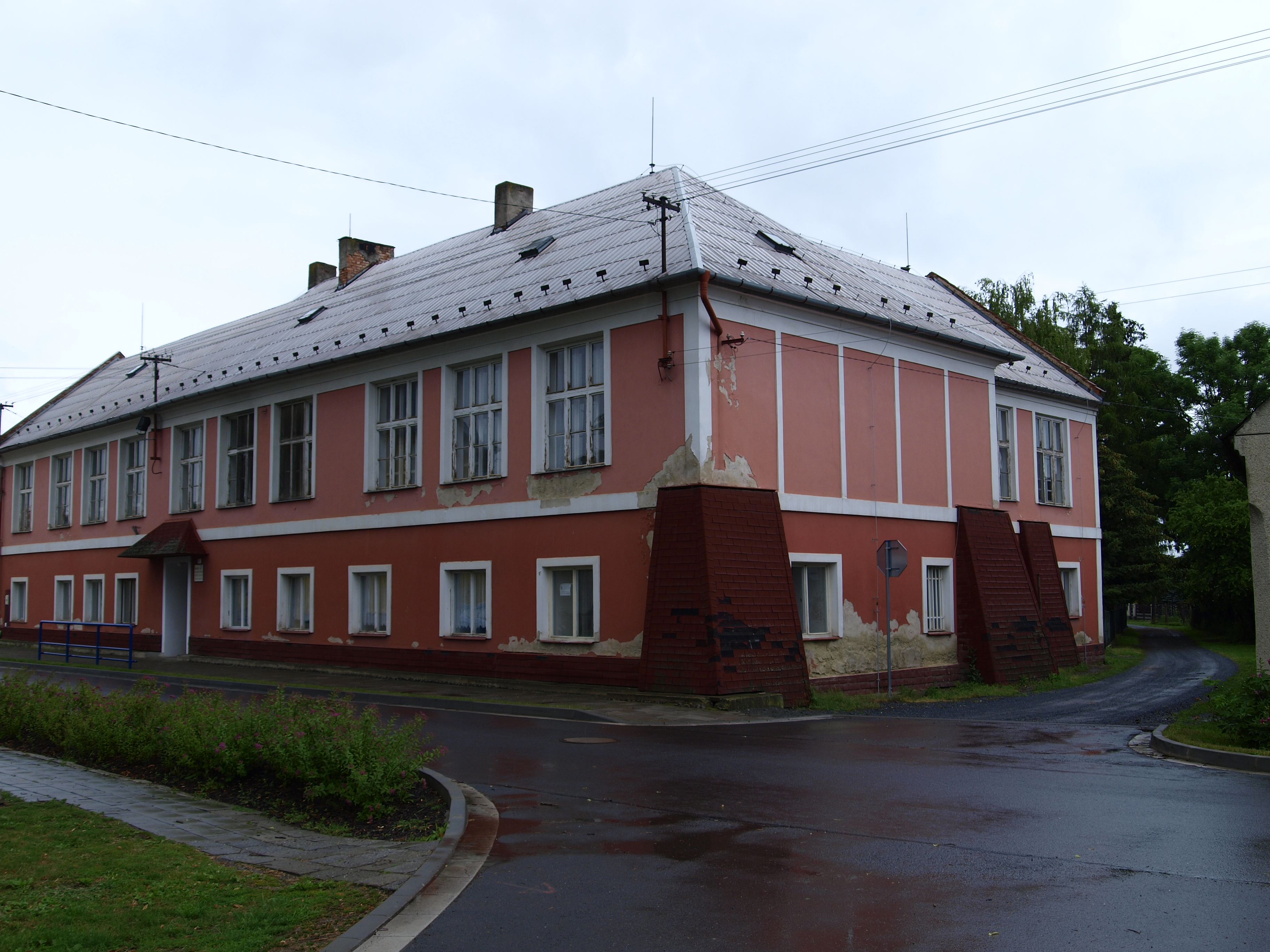 Pňovice, Obecní knihovna, č. p. 10